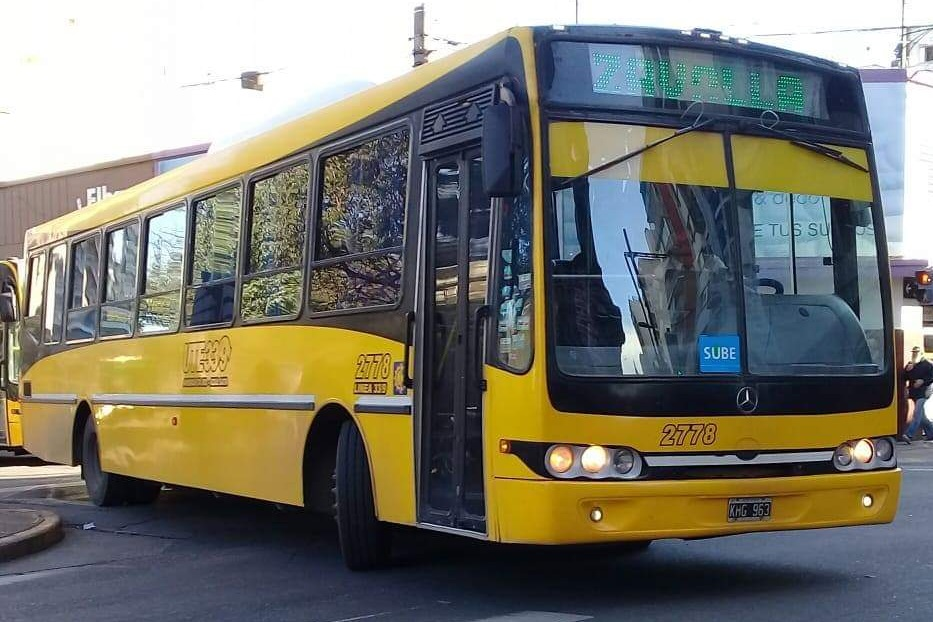 Interno 2778 de la empresa UTE 33/9, prestadora de la línea 267